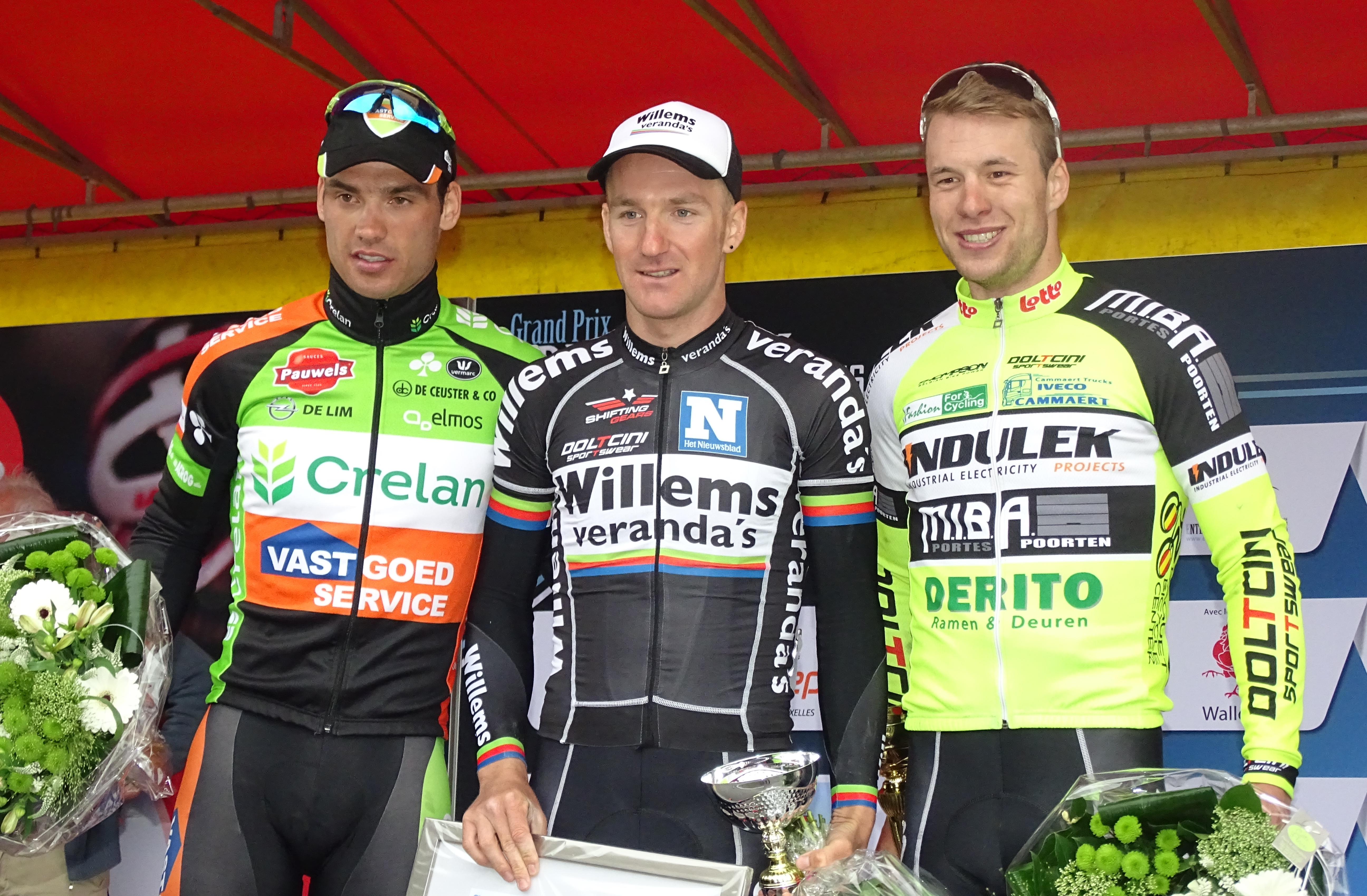 Reportage réalisé le dimanche 15 mai à l'occasion de l'arrivée du Grand Prix Criquielion 2016 à Deux-Acren, Belgique.